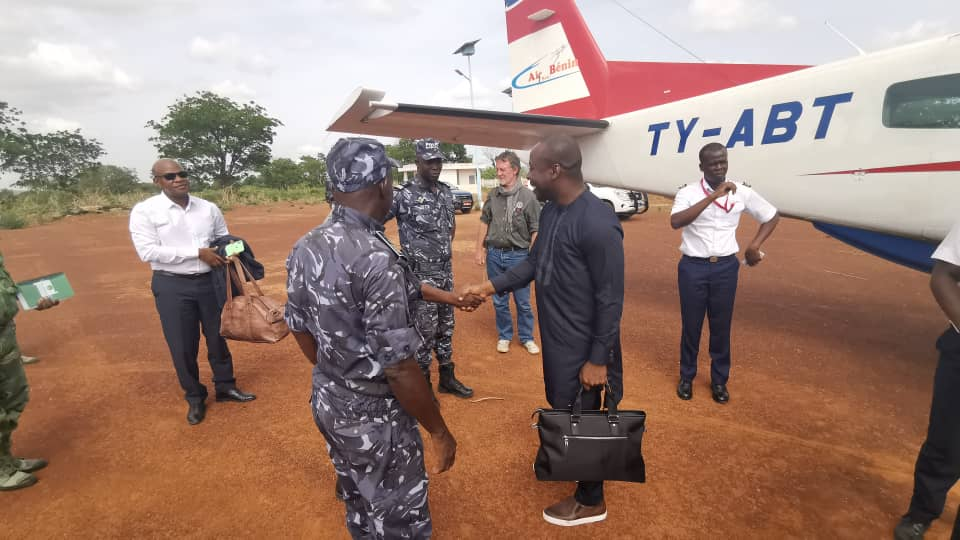 Oswald Homéky, ministre béninois du tourisme au parc Pendjari après la disparition des deux touristes français